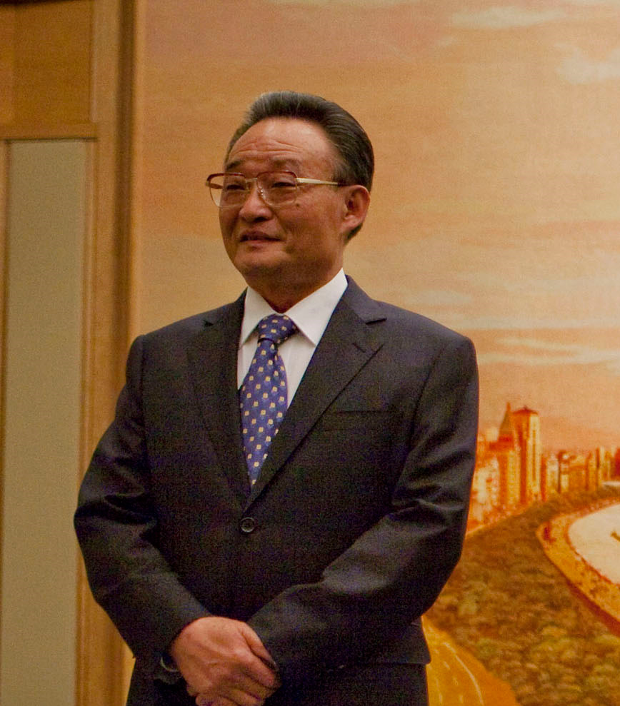 吴 邦国